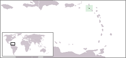 Description:Carte de localisation de Saint-Eustache, Antilles néerlandaises, Pays-Bas Auteur:Rémih à partir d'une carte du CIA WorldFactBook